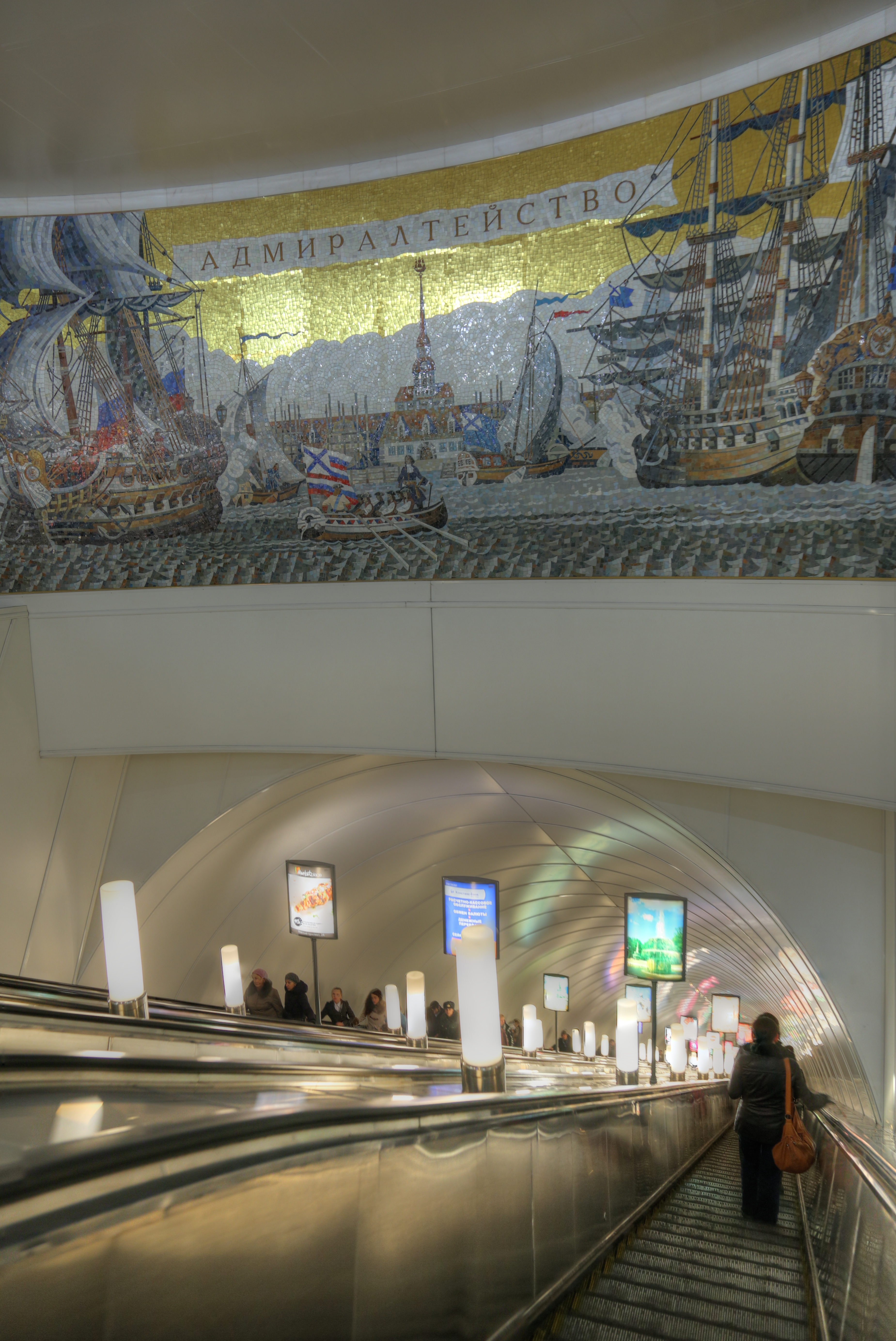 Адмиралтейская Station(subway)